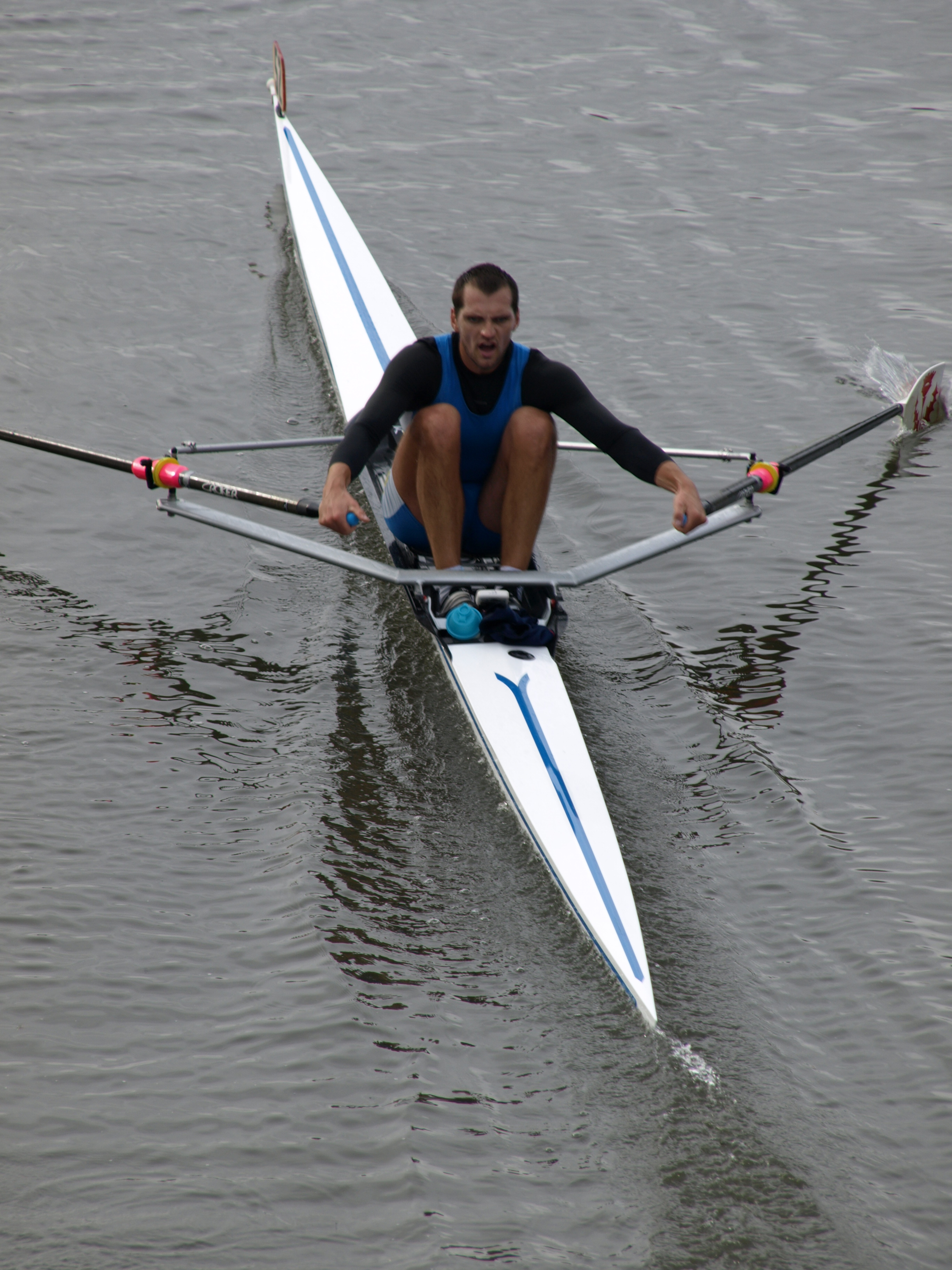 TDR Toul, novembre 2012